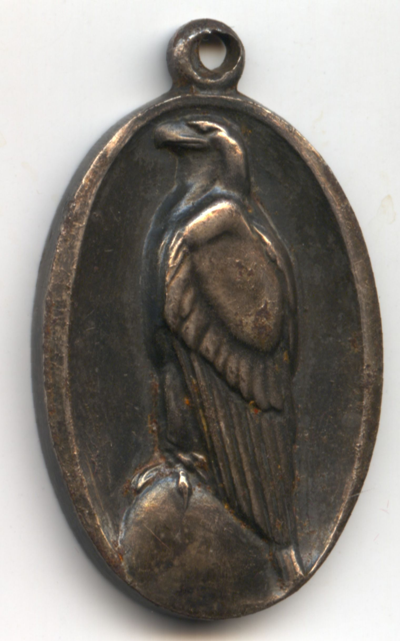 Medaille zur Benagelung des "Eisernen Adlers" in Frankfurt